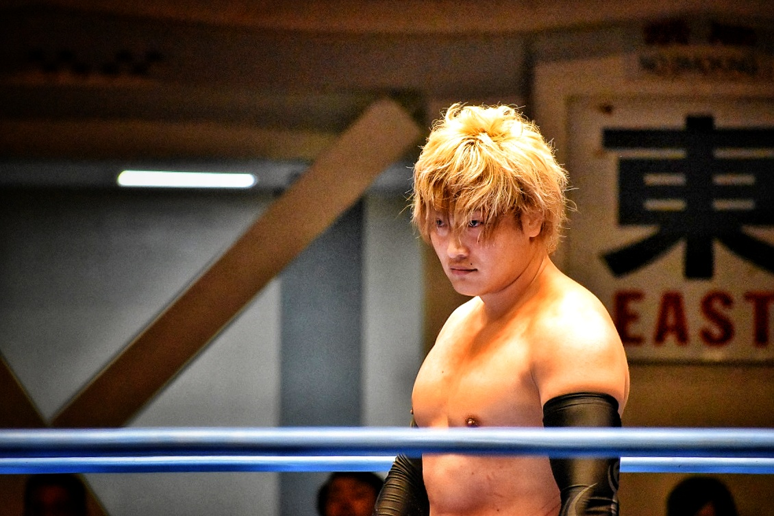 プロレスラーの滝澤大志